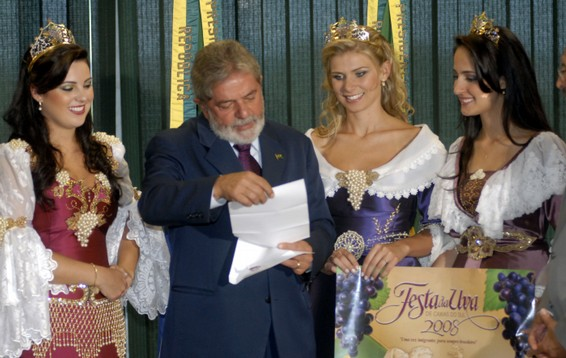 Brasília - Presidente Luiz Inácio Lula da Silva recebe convite para a Festa Nacional da Uva de Caxias do Sul (RS).